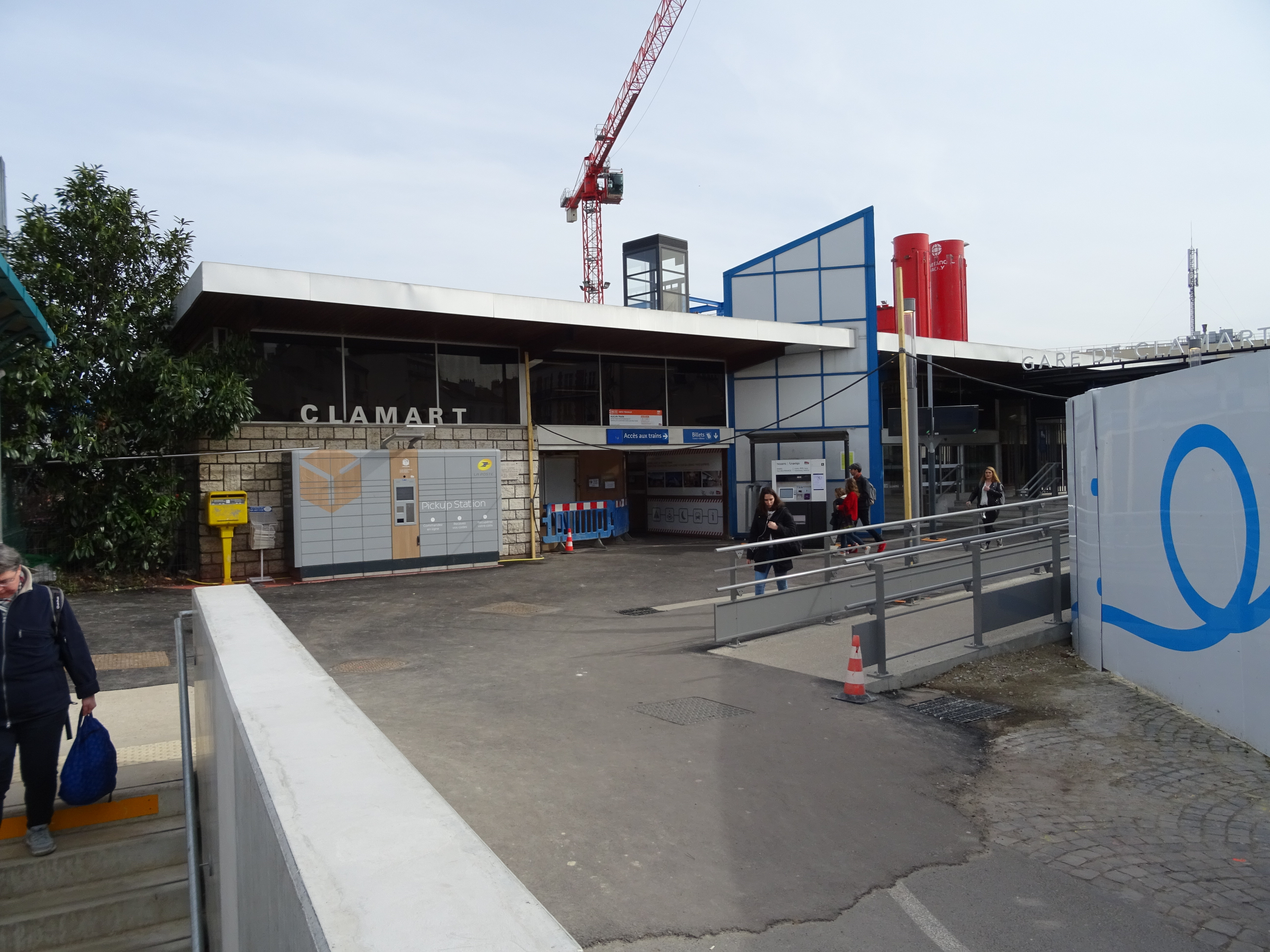 Bâtiment gare de Clamart